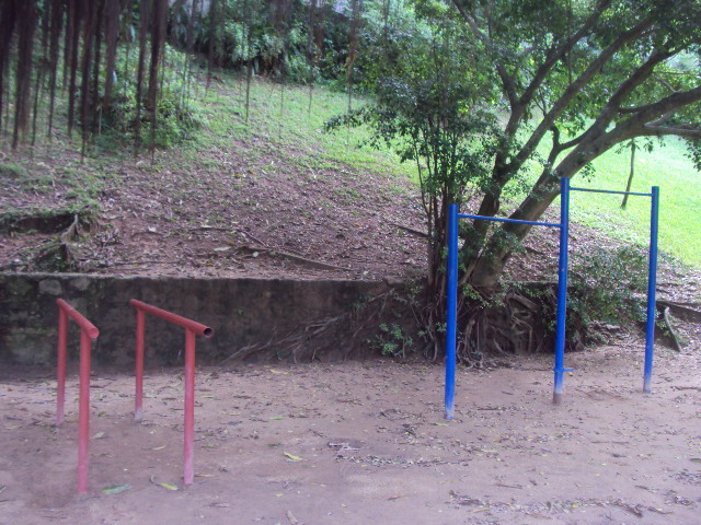 Seção de ginástica do Parque Eduardo Guinle, no bairro Laranjeiras, Rio de Janeiro-RJ, Brasil.